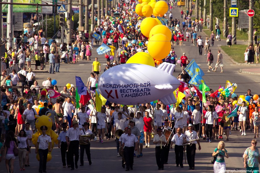 Колонна XI международного фестиваля гандбола. День города Тольятти. 2012